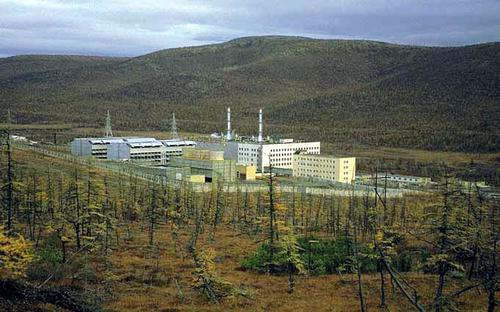 Билибинская АЭС